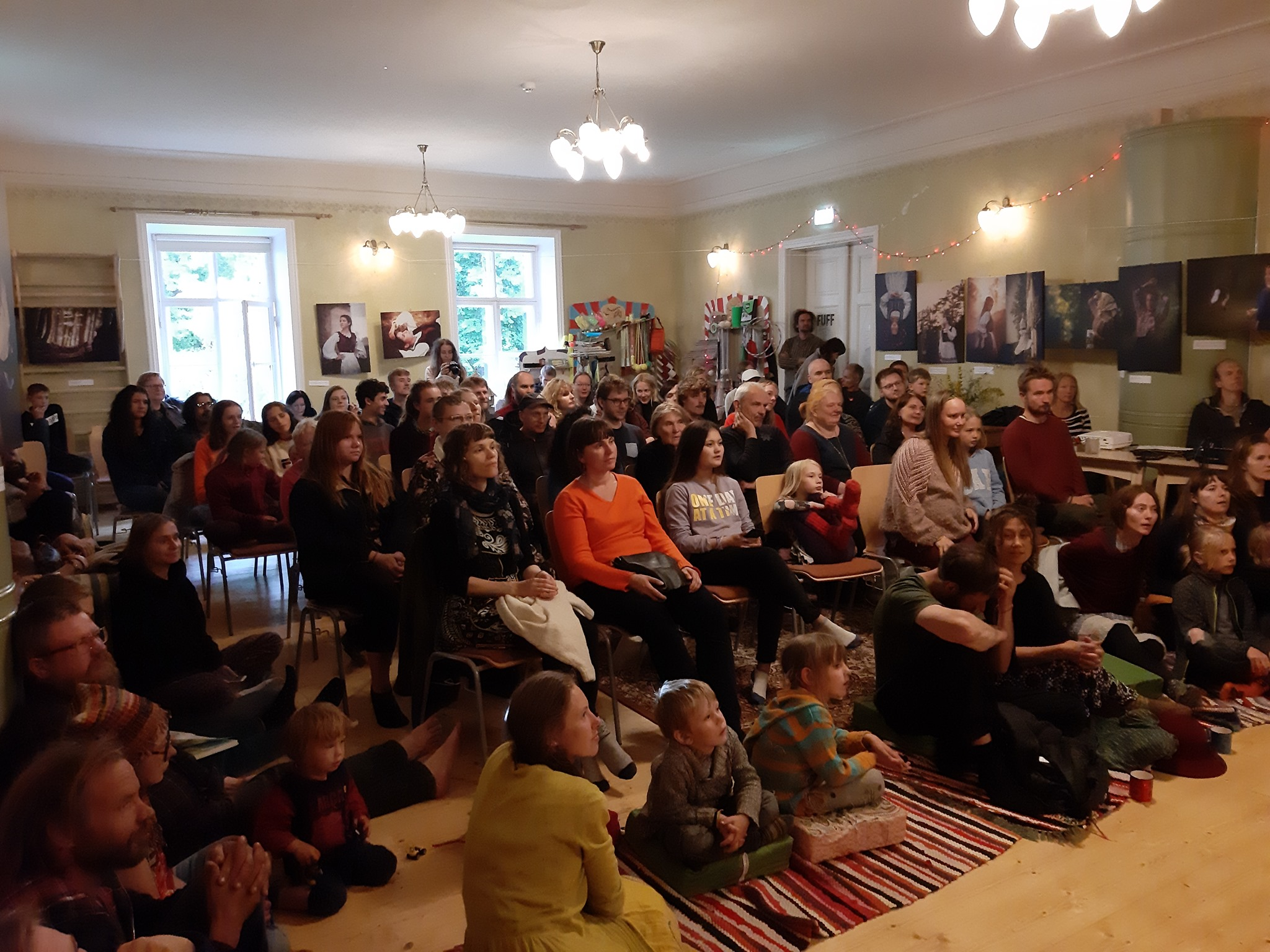 Soome-ugri filmifestival. Pealtvaatajad